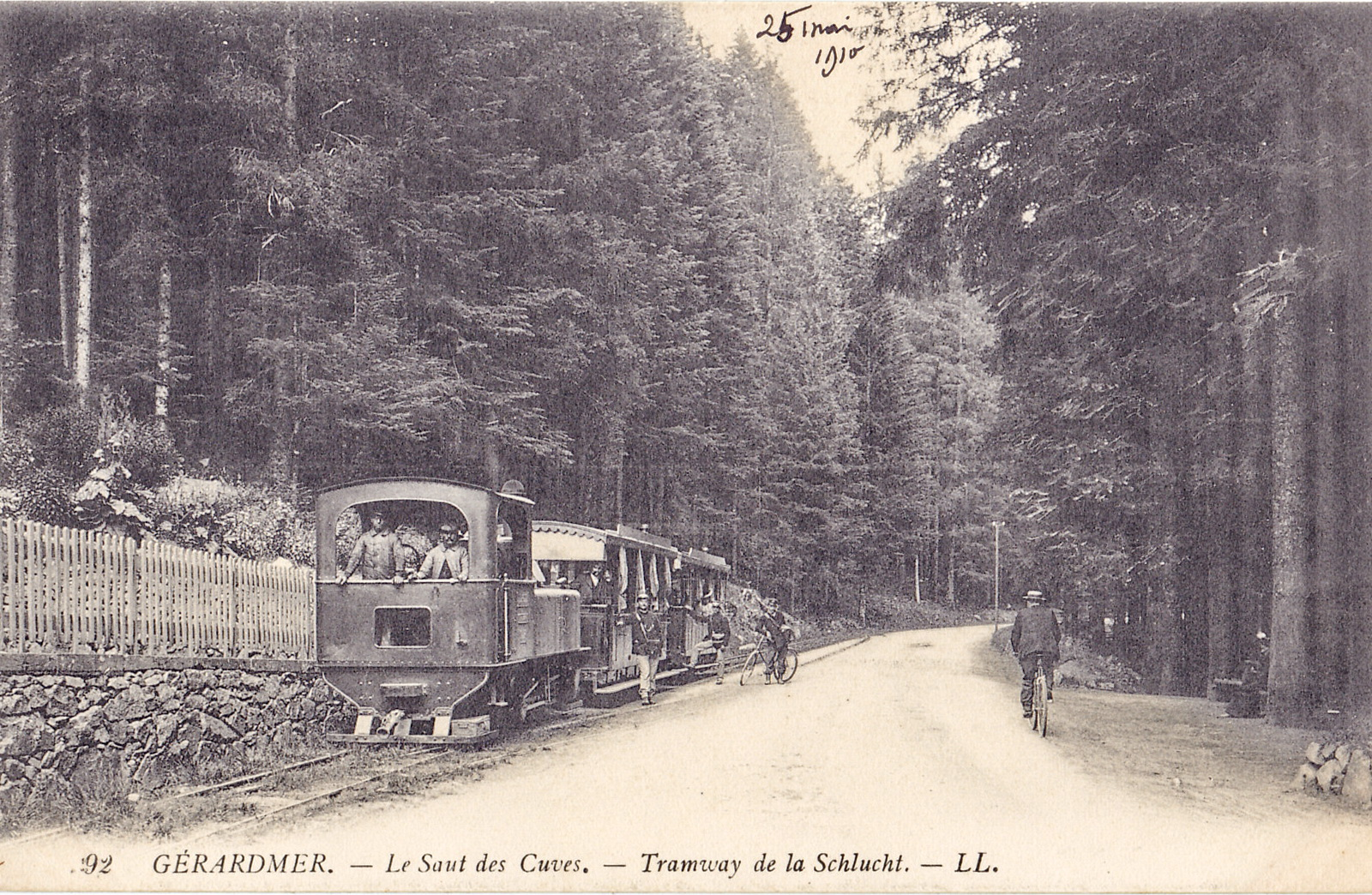 Carte postale ancienne éditée par LL, n°92 : GERARDMER - Le Saut des Cuves - Tramway de la Schlucht